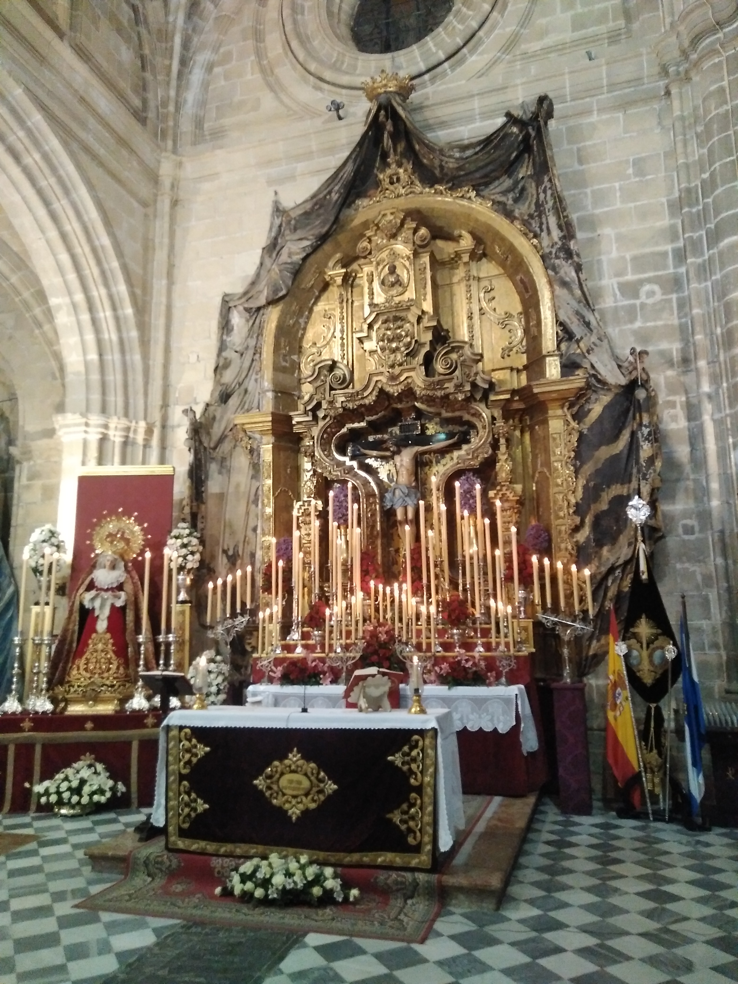 Titulares de la Hermandad de la Viga en Jerez de la Frontera (Andalucia, España)